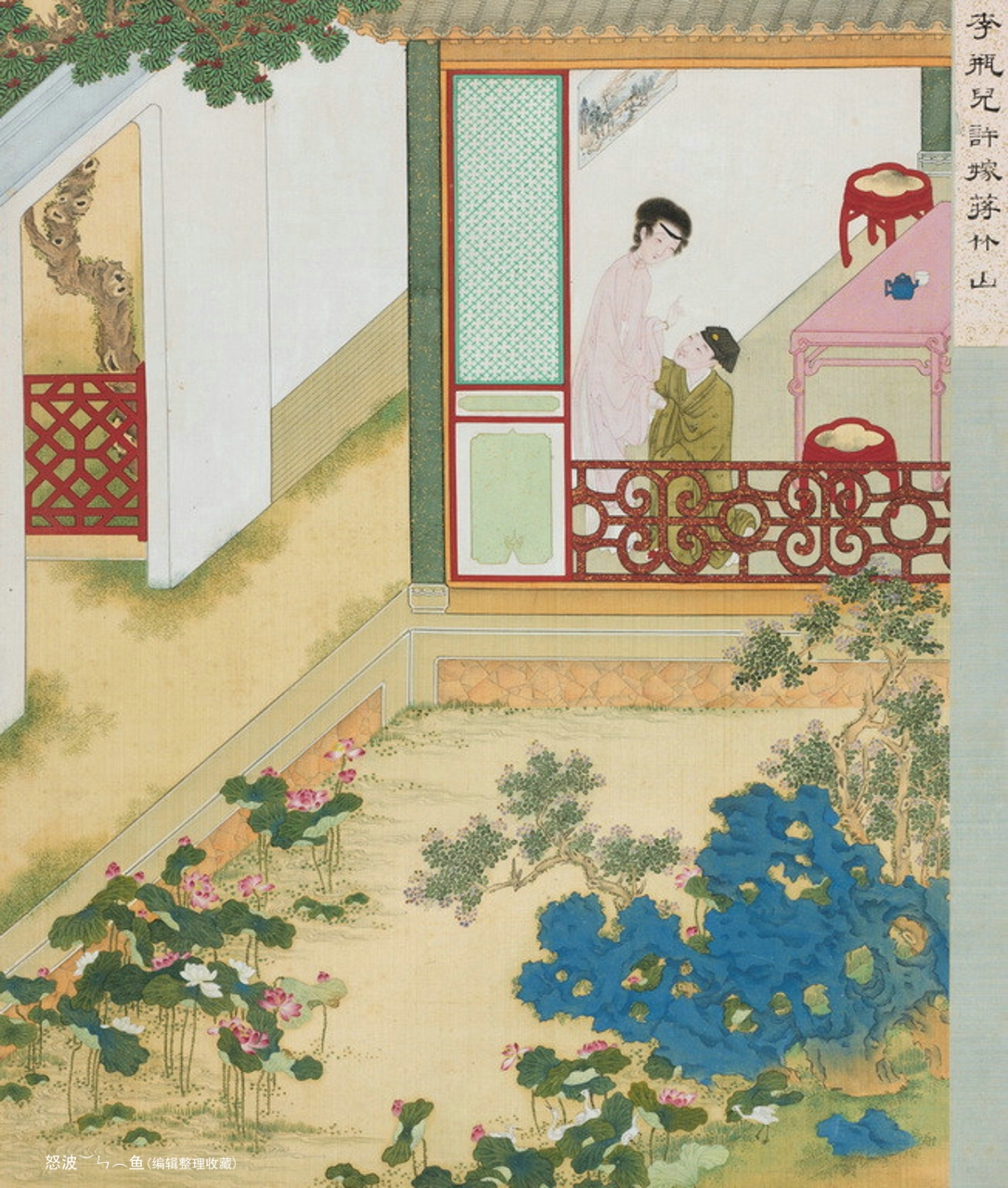 中文（香港）: 金瓶梅插圖